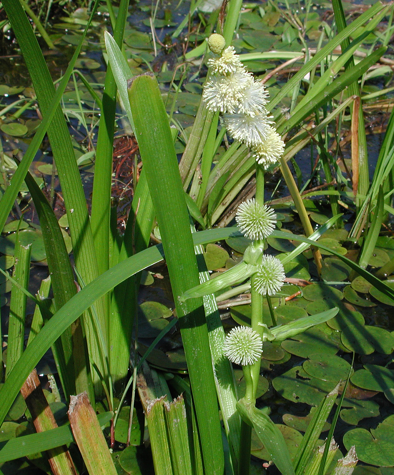 Sparganium emersum, Einfacher Igelkolben, Kirchwerder, Elbmarsch bei Hamburg, Germany